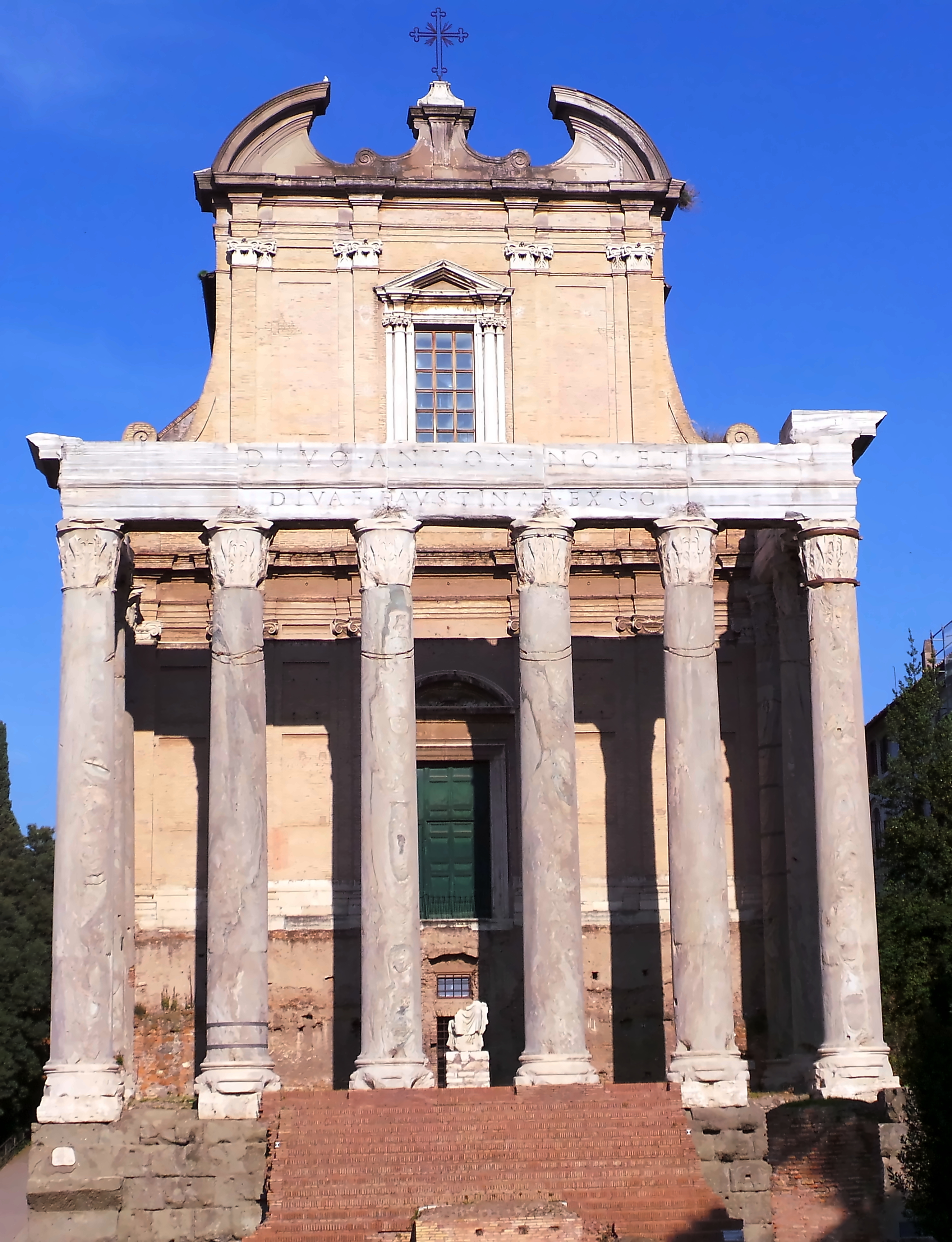 Frontansicht auf den Tempel des Antonius Pius und der Faustina